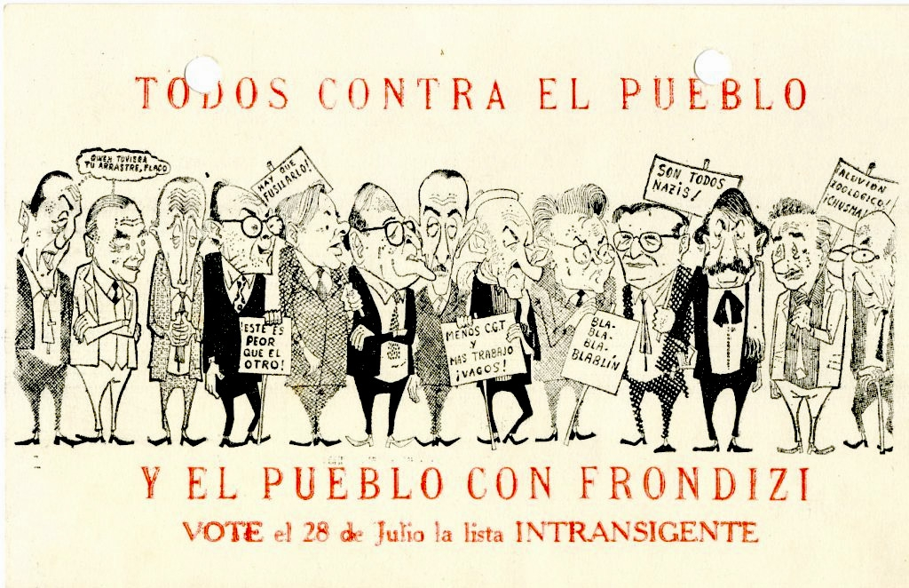 Afiches ridiculizantes de las grandes figuras radicales de la UCR del Pueblo, durante la interna con la UCR Instransingente.